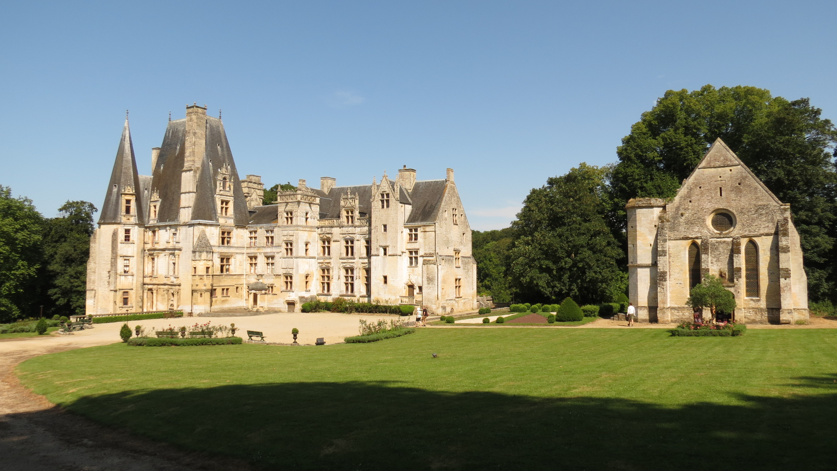 Château de Fontaine-Henry